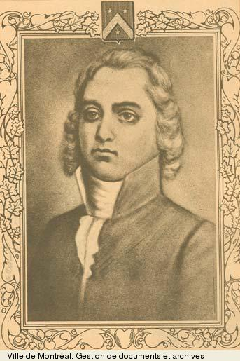 Illustration de Louis de Coulonge, tiré des archives de la ville de Montréal.